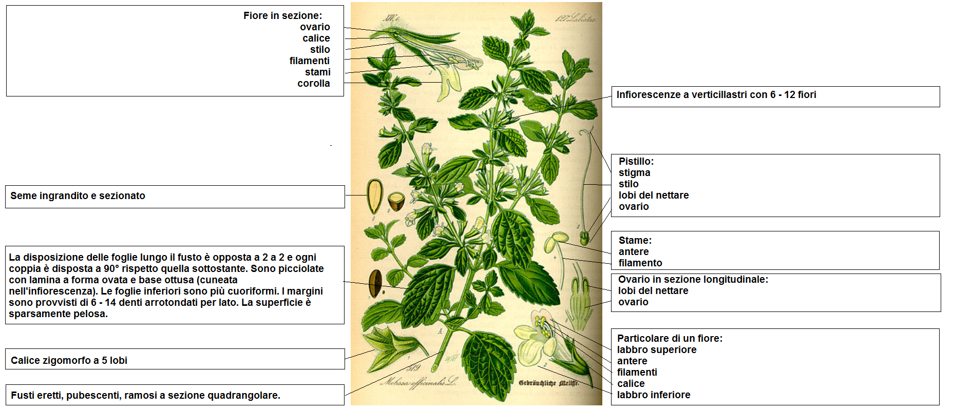 Melissa officinalis, Family: Labiatae, from Flora von Deutschland Österreich und der Schweiz, Gera 1885